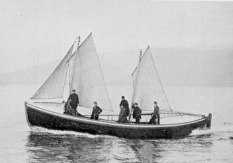 CCG motor lifeboat, 1907